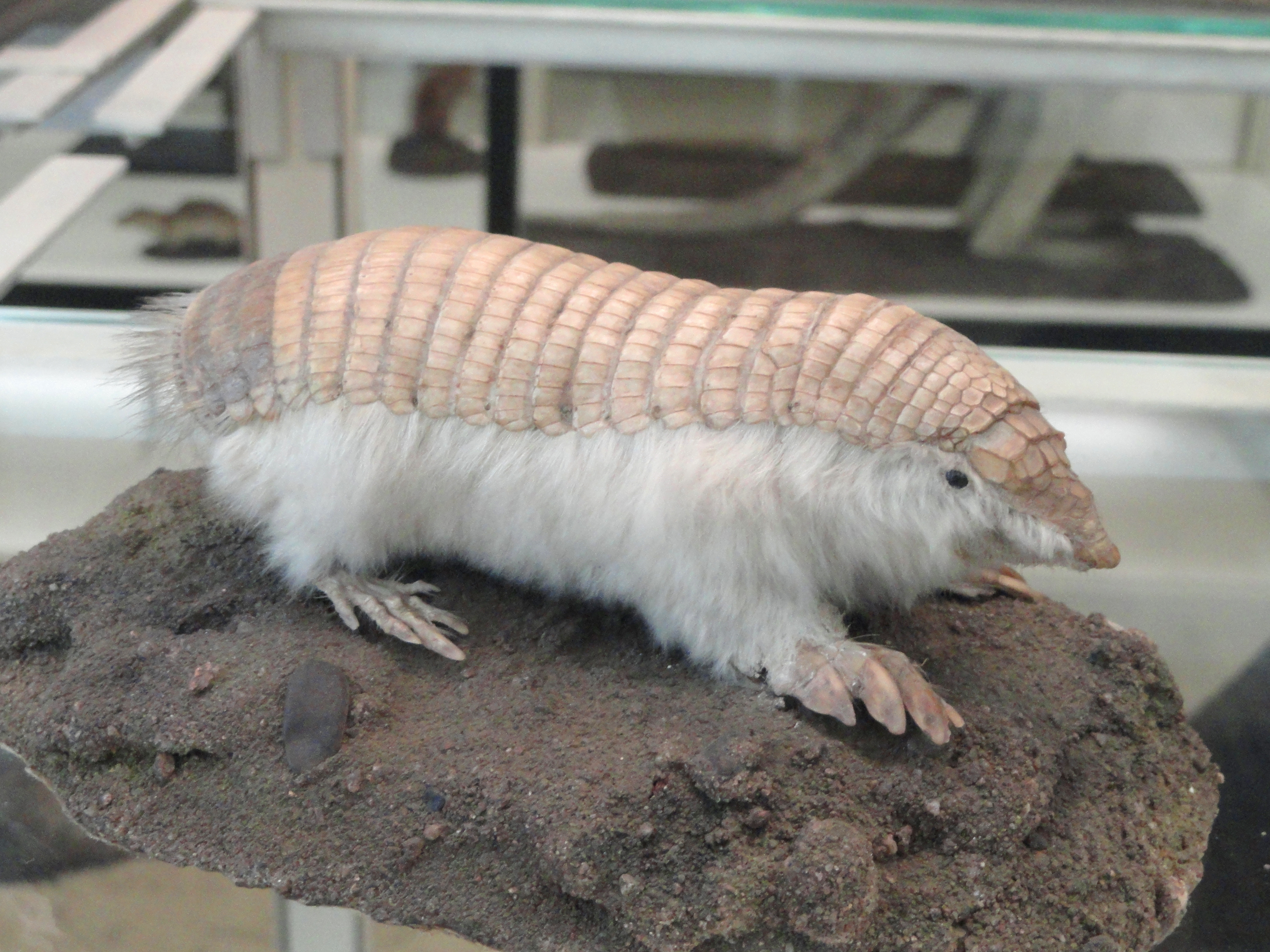 Exhibit in Naturmuseum Senckenberg, Frankfurt am Main, Germany.